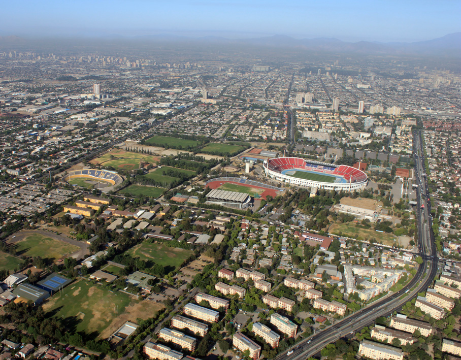 Vista aérea del Estadio Nacional de Chile, observada desde el este.